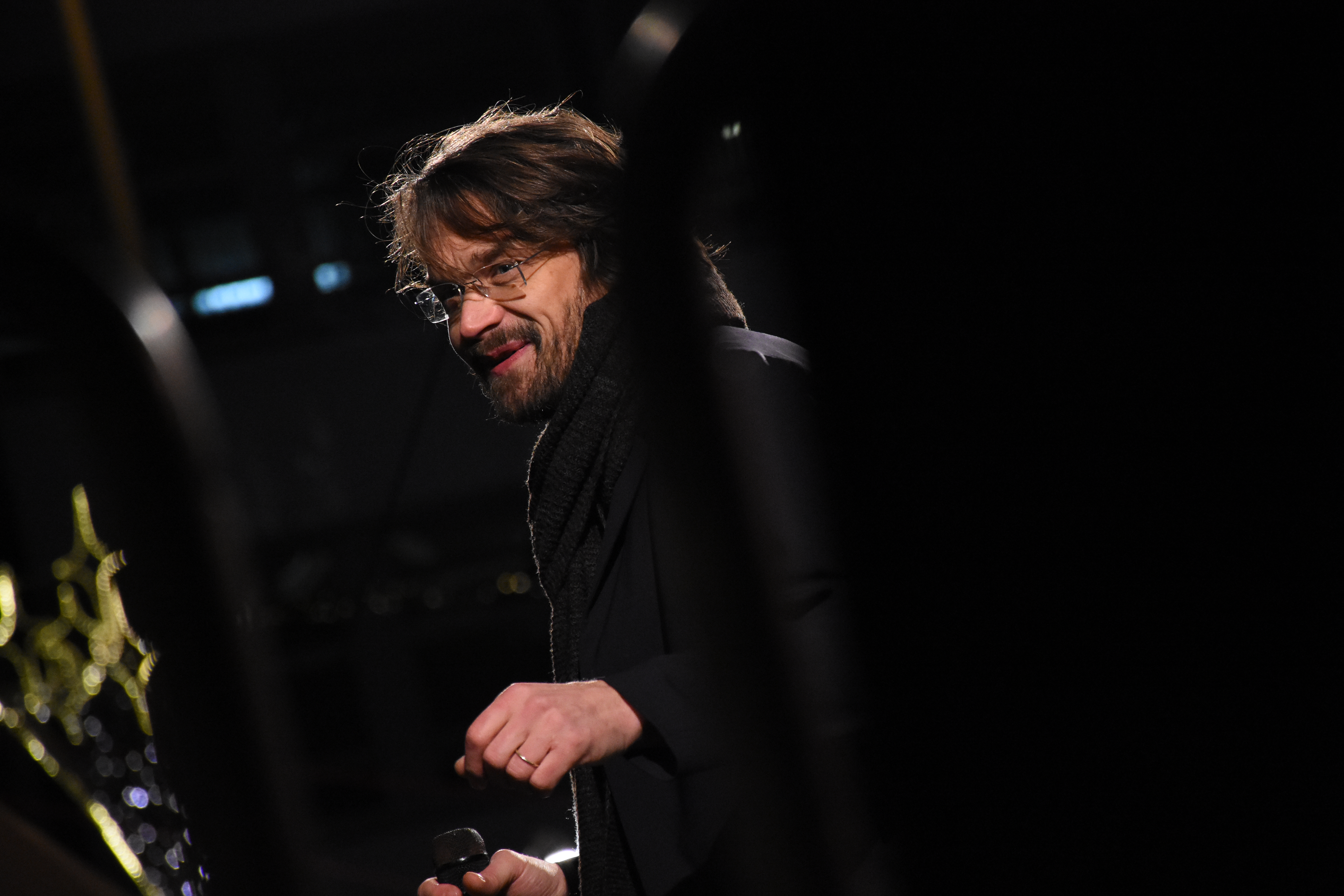 Dan Bárta na Náměstí Svobody v Brně v roce 2016